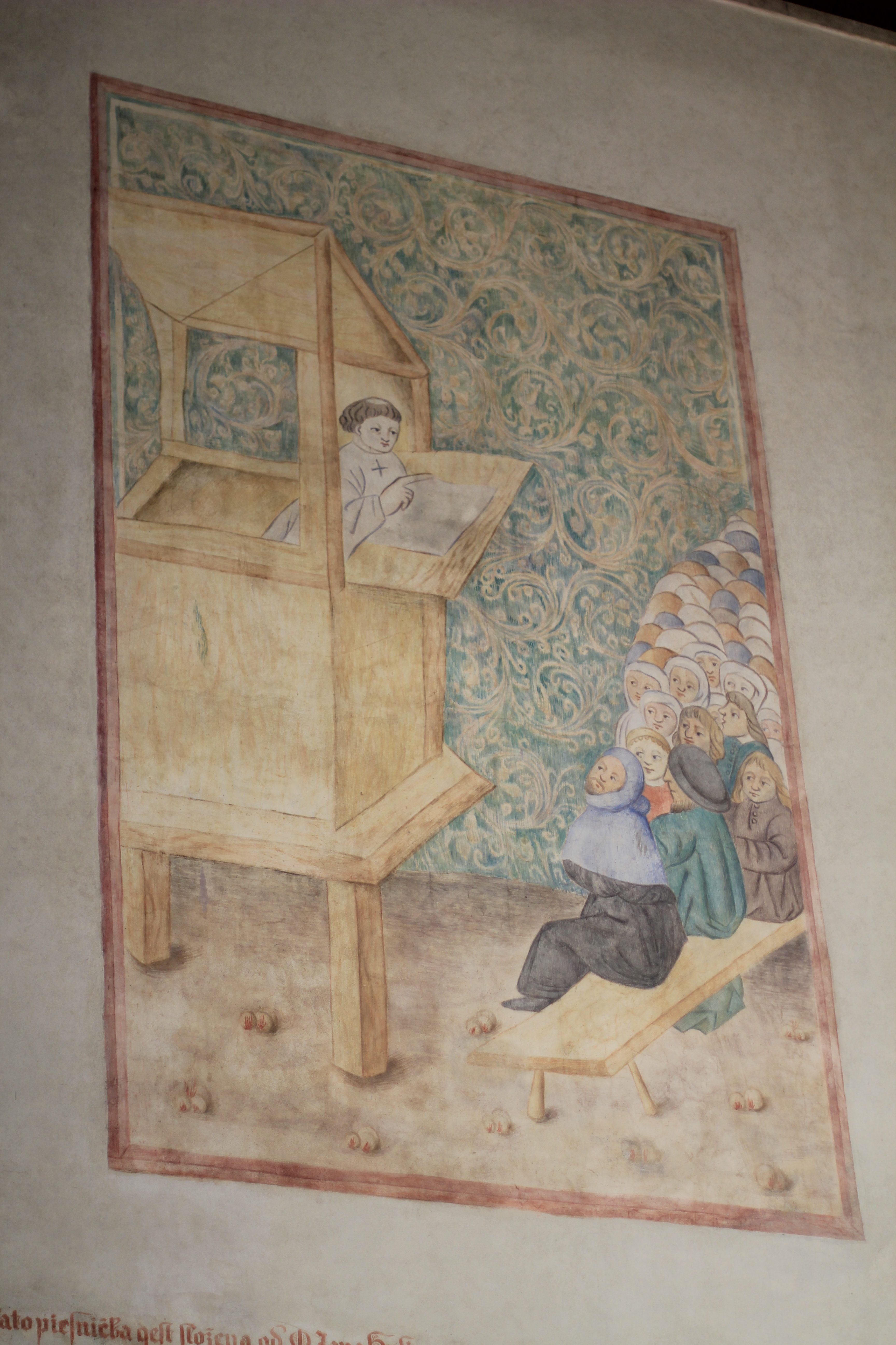 Maleri i Betlehemskapellet